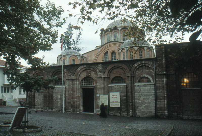 Chora camii Istanbul